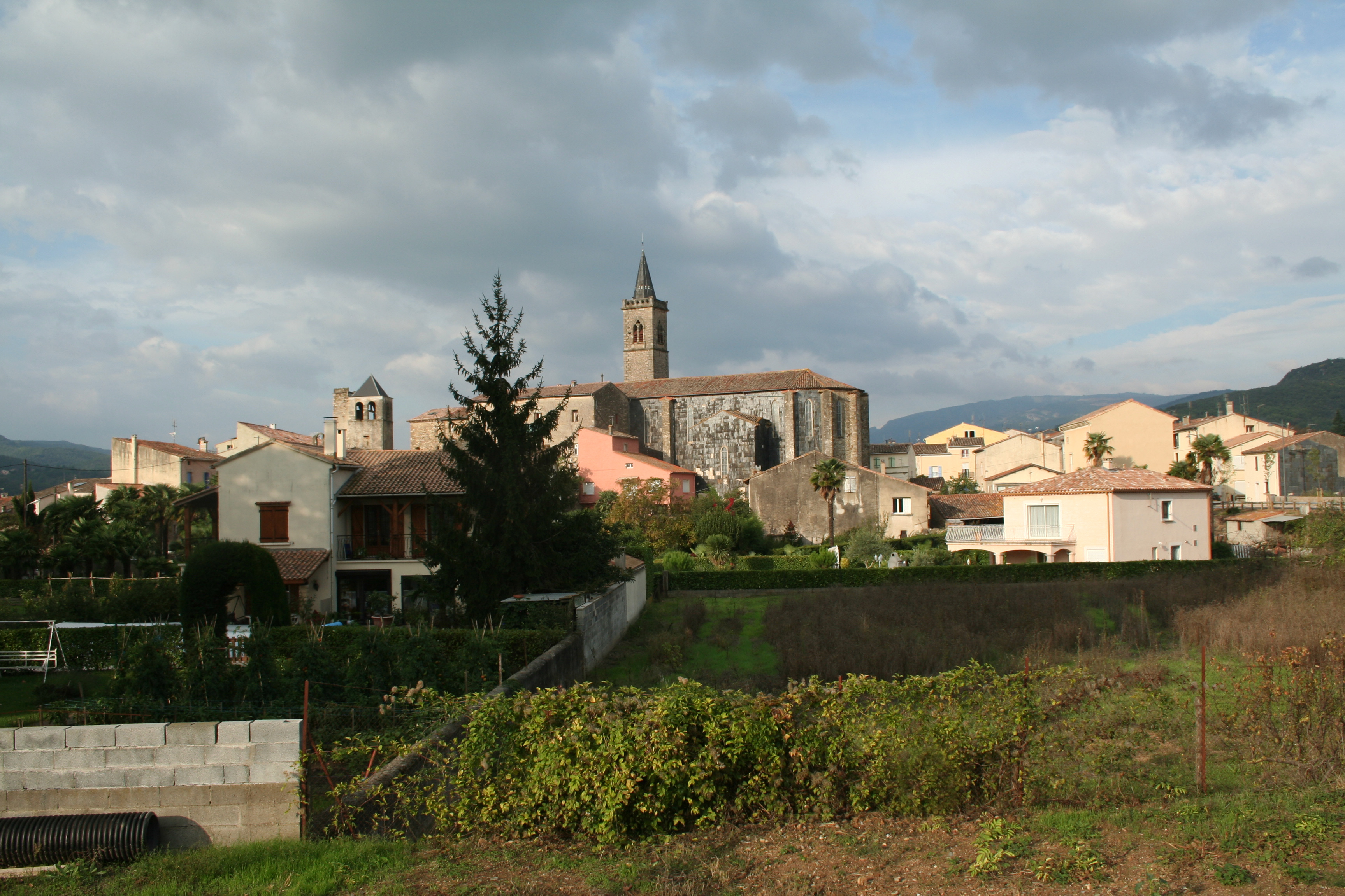 Hérépian (Hérault) - vue générale.